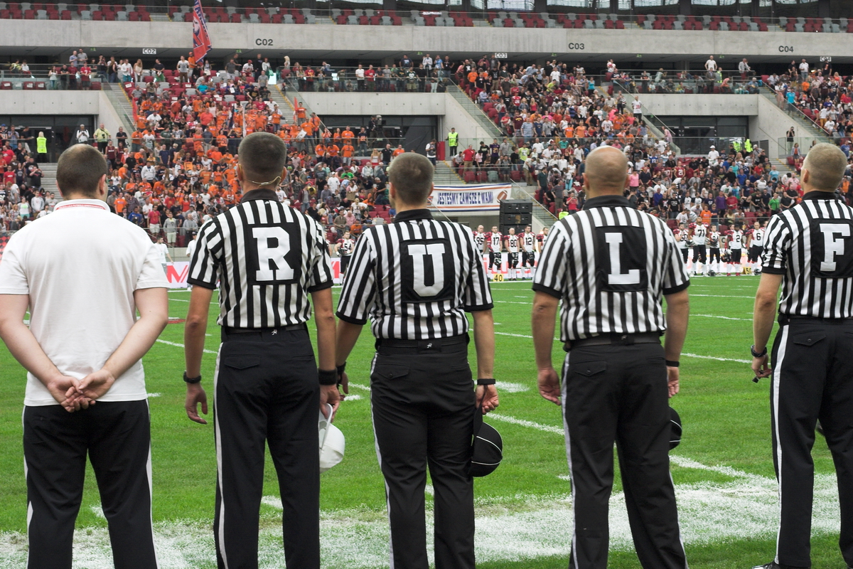 Sędziowie futbolu amerykańskiego (Stadion Narodowy, Warszawa) 2013-07-14